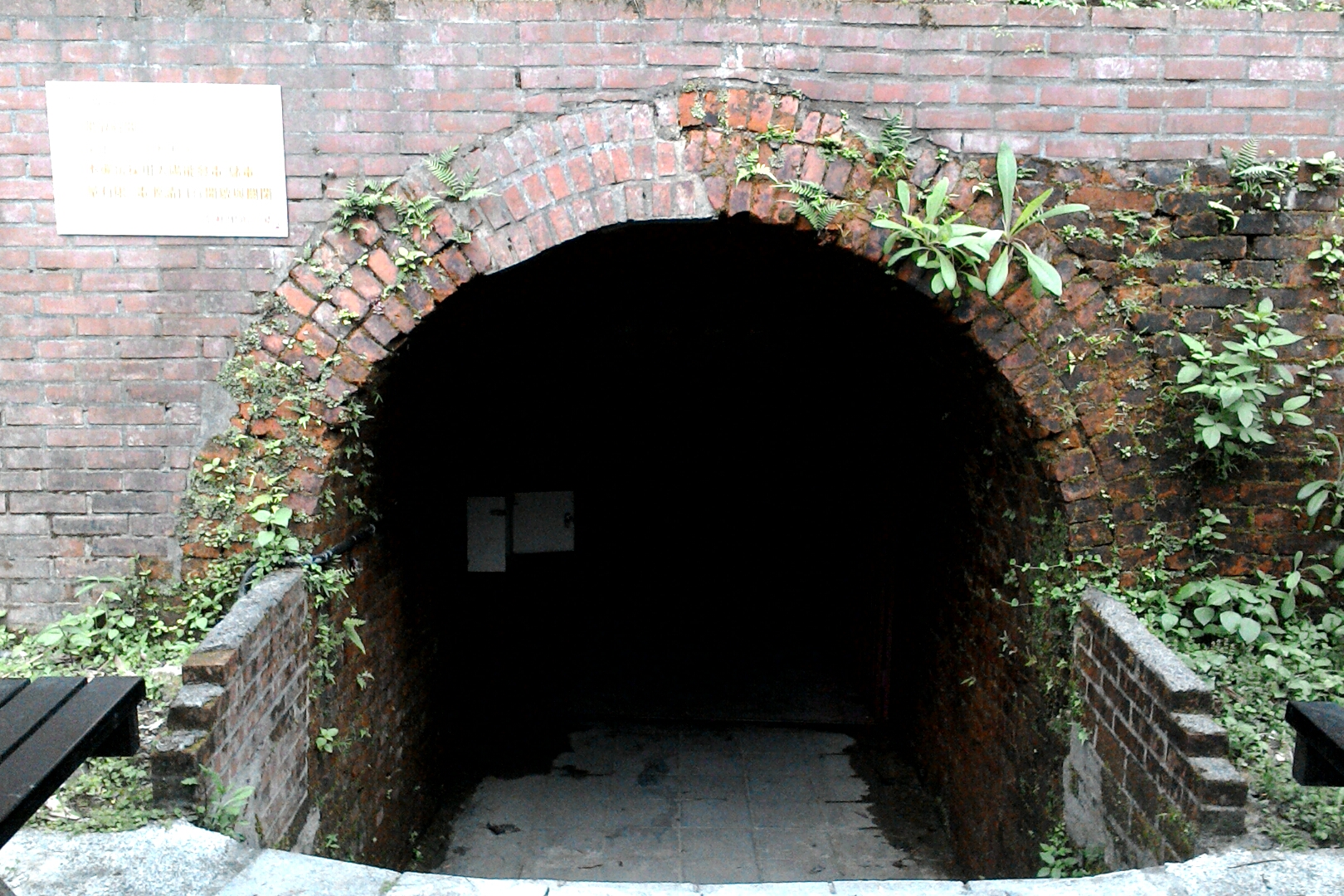 德興煤礦坑口,台北市信義區吳興次分區泰和里